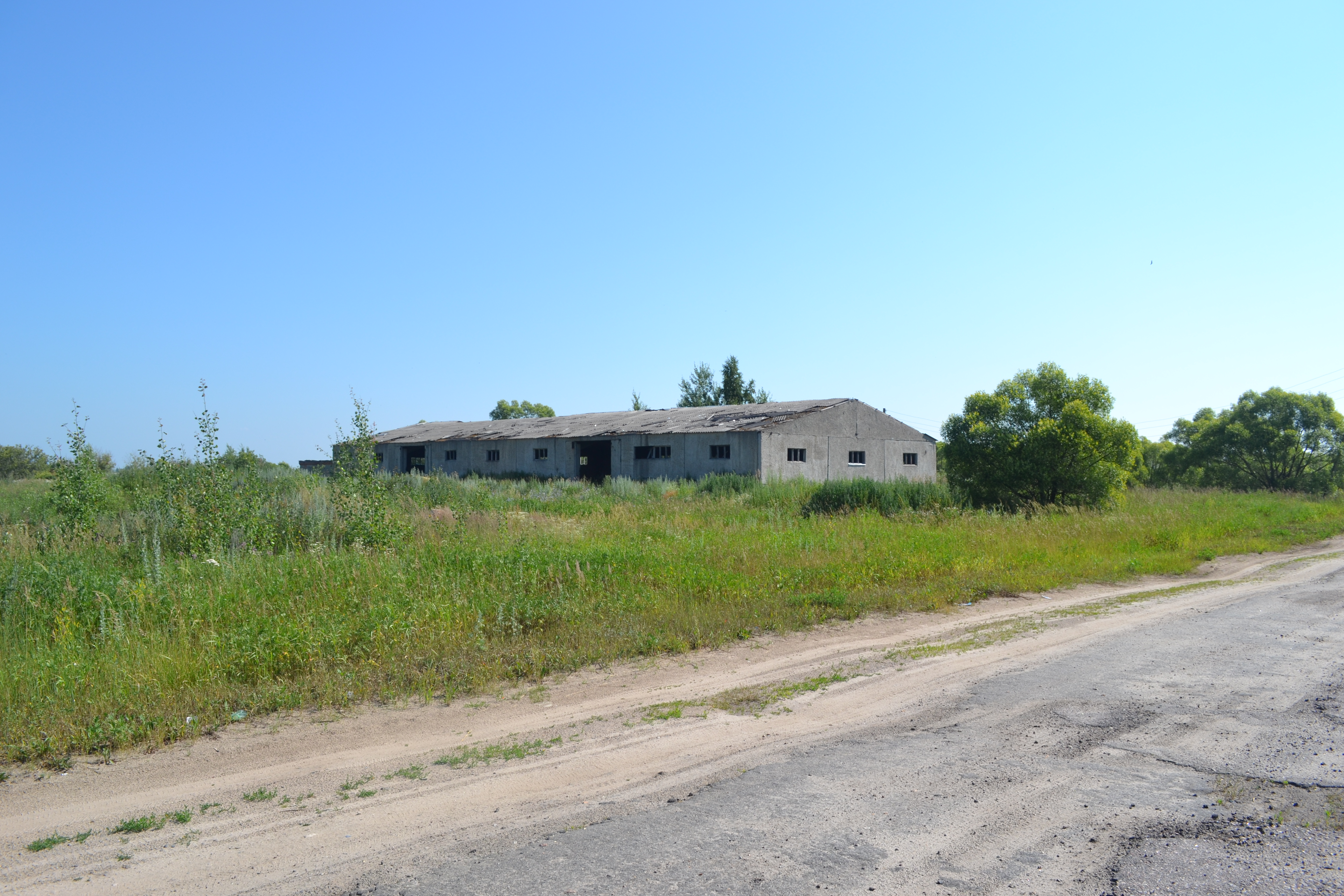 Ферма около Леки (Шатурский район)